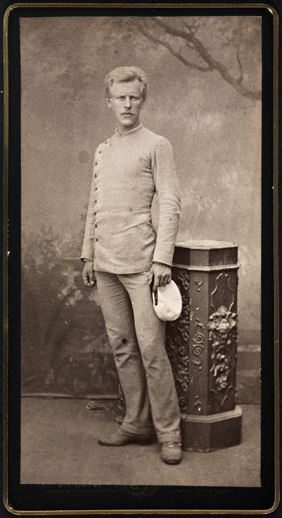 Фритьоф Нансен в Риме, 1886 год